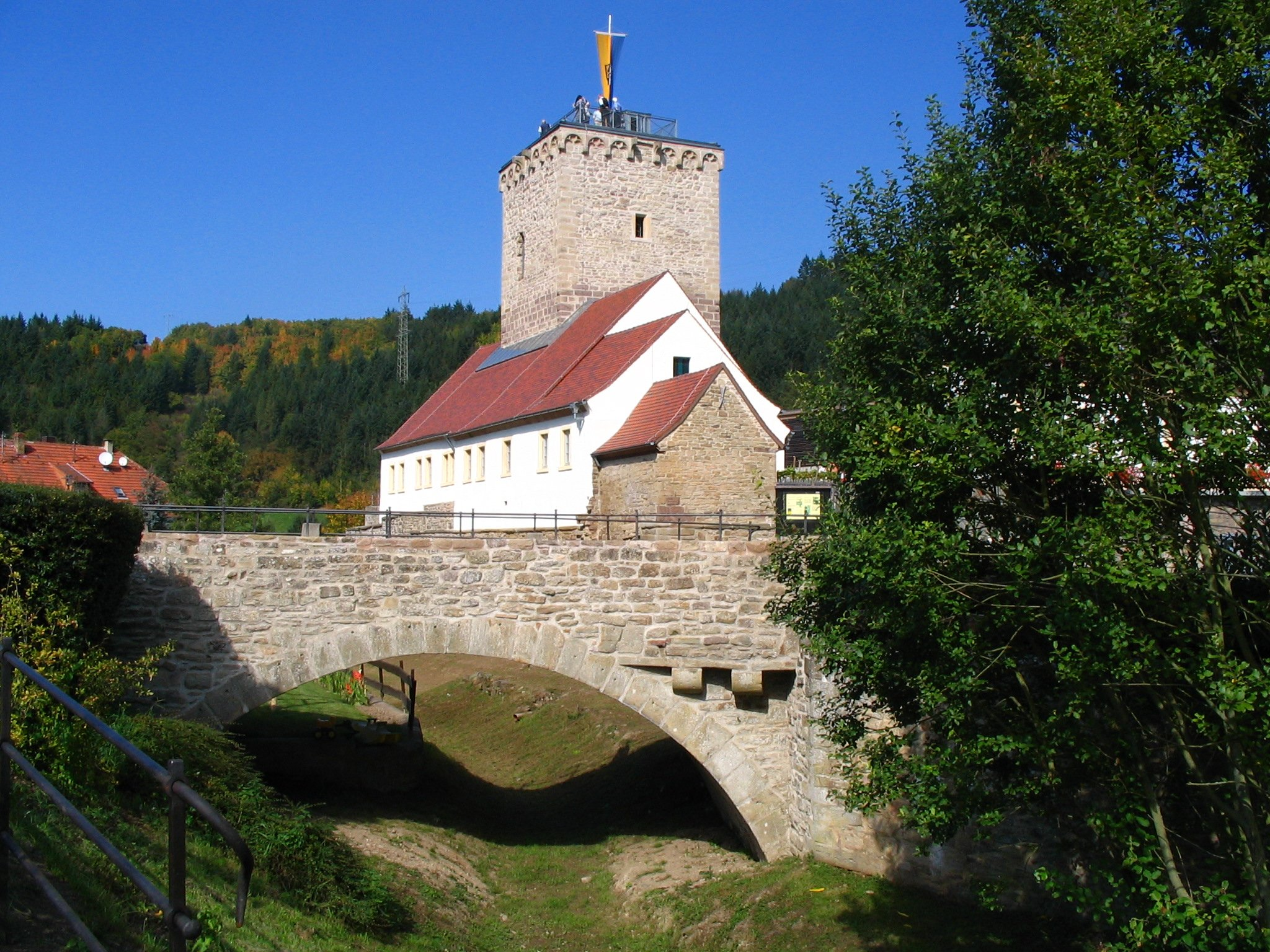 Die Wasserburg Reipoltskirchen war Sitz der Herren von Hohenfels, die eine Nebenlinie der Herren von Bolanden waren. Die Familie starb 1602 aus. 1628 wurde die Reichsherrschaft Reipoltskirchen unter den Grafen von Lewenhaupt-Rasburg und zwei Vettern des letzten Herren von Hohenfels, aufgeteilt. Über eine Erbtochter kam die Hälfte des Besitzes an die Grafen von Manderscheid, die ihren Anteil 1730 an die Grafen von Hillesheim verkauften. Die andere Hälfte kam nach mehrfachem Besitzerwechsel 1777 an die Karoline zu Isenburg und Büdingen, älteste Tochter des Kurfürsten Karl Theodor von der Pfalz.